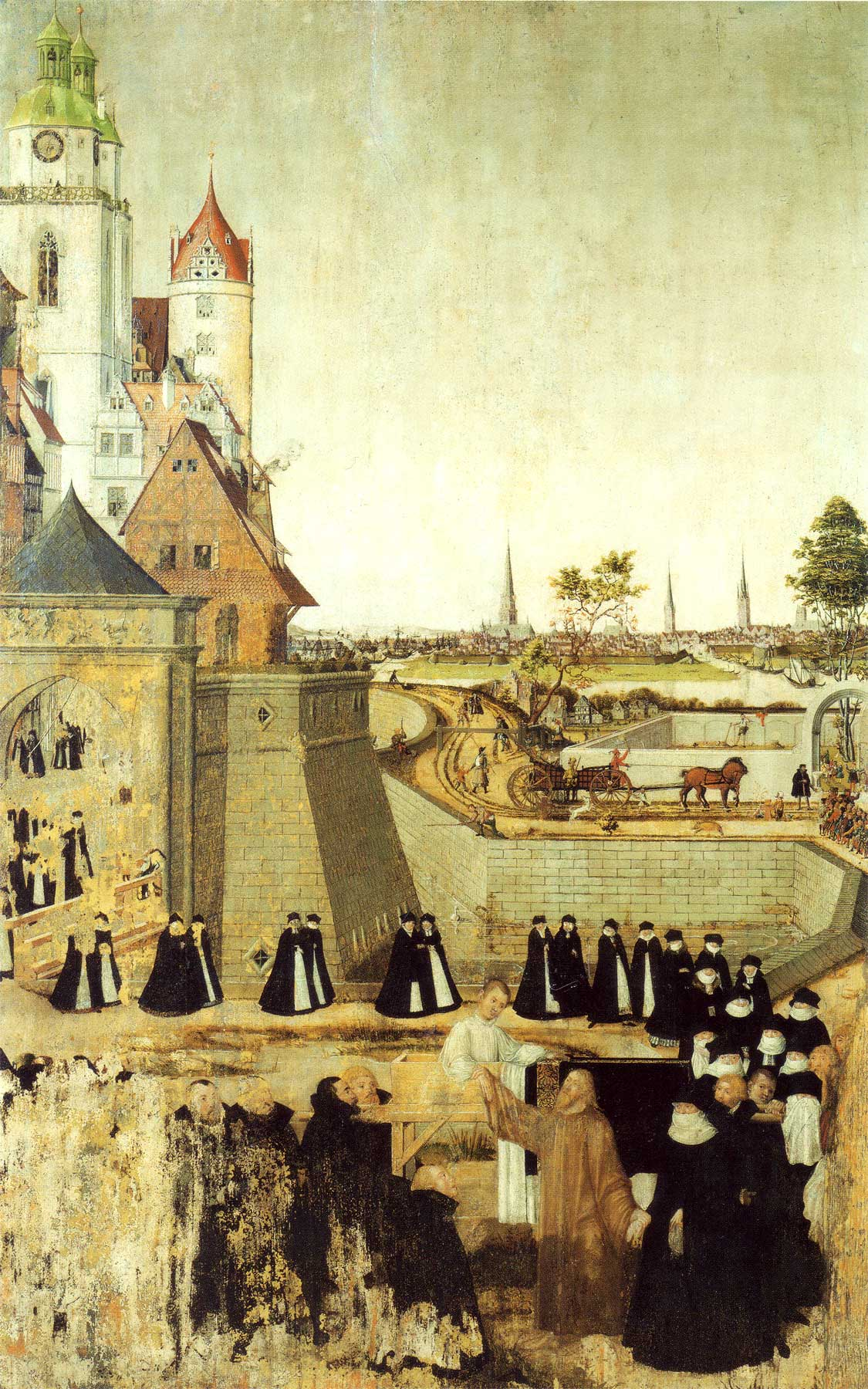 Epitaph for Franziskus Oldehorst